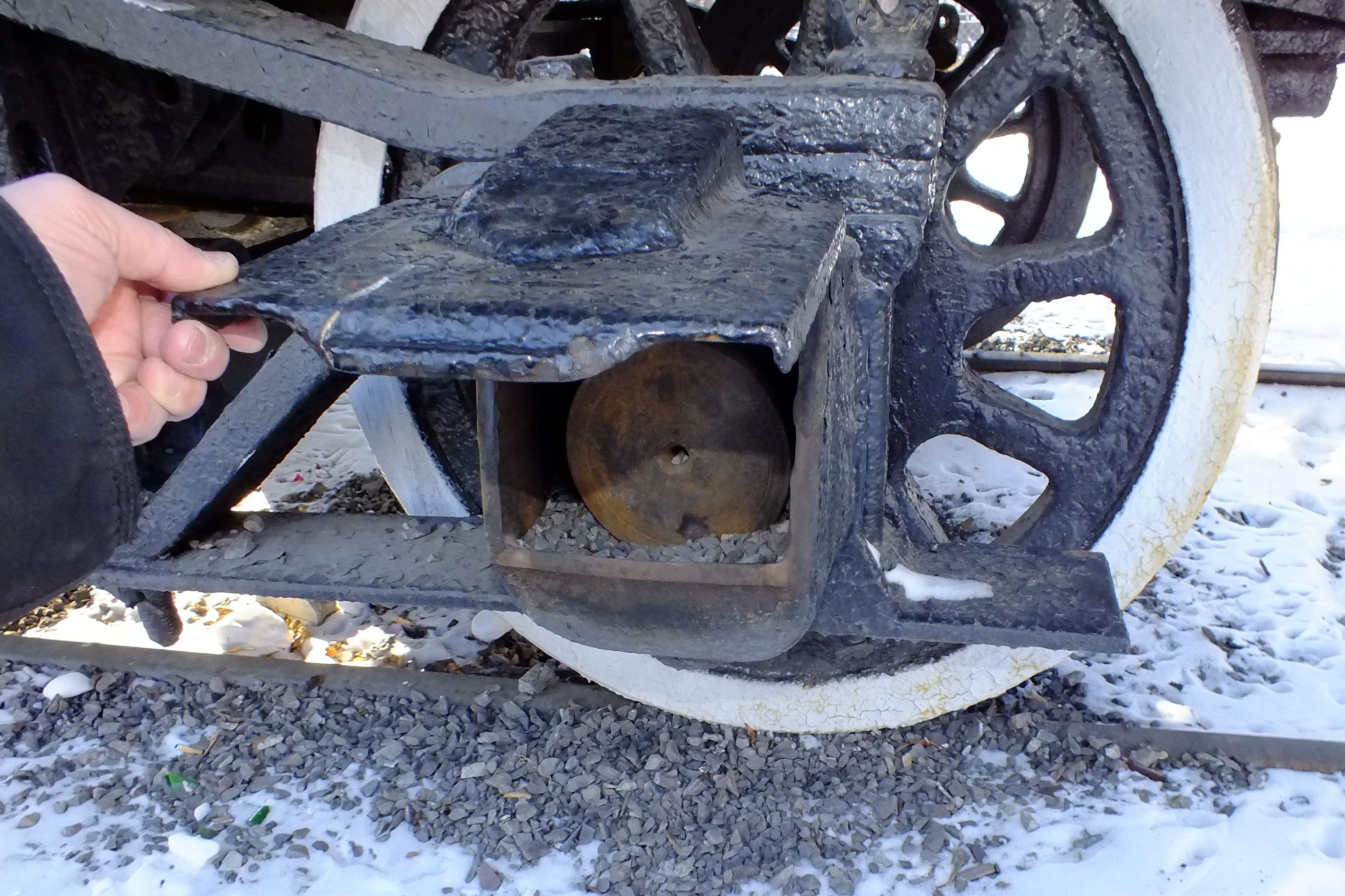 Russian locomotive Ел-629